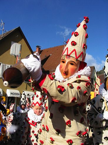 Roter Röslehansel aus Wolfach mit Konfettispritze